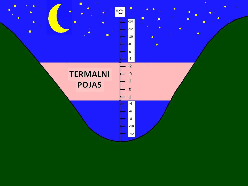 na slici je vidljiva razlika u temperaturama od podnožja do vrha planine. U zoni termalnog pojasa je najviša temperatura.